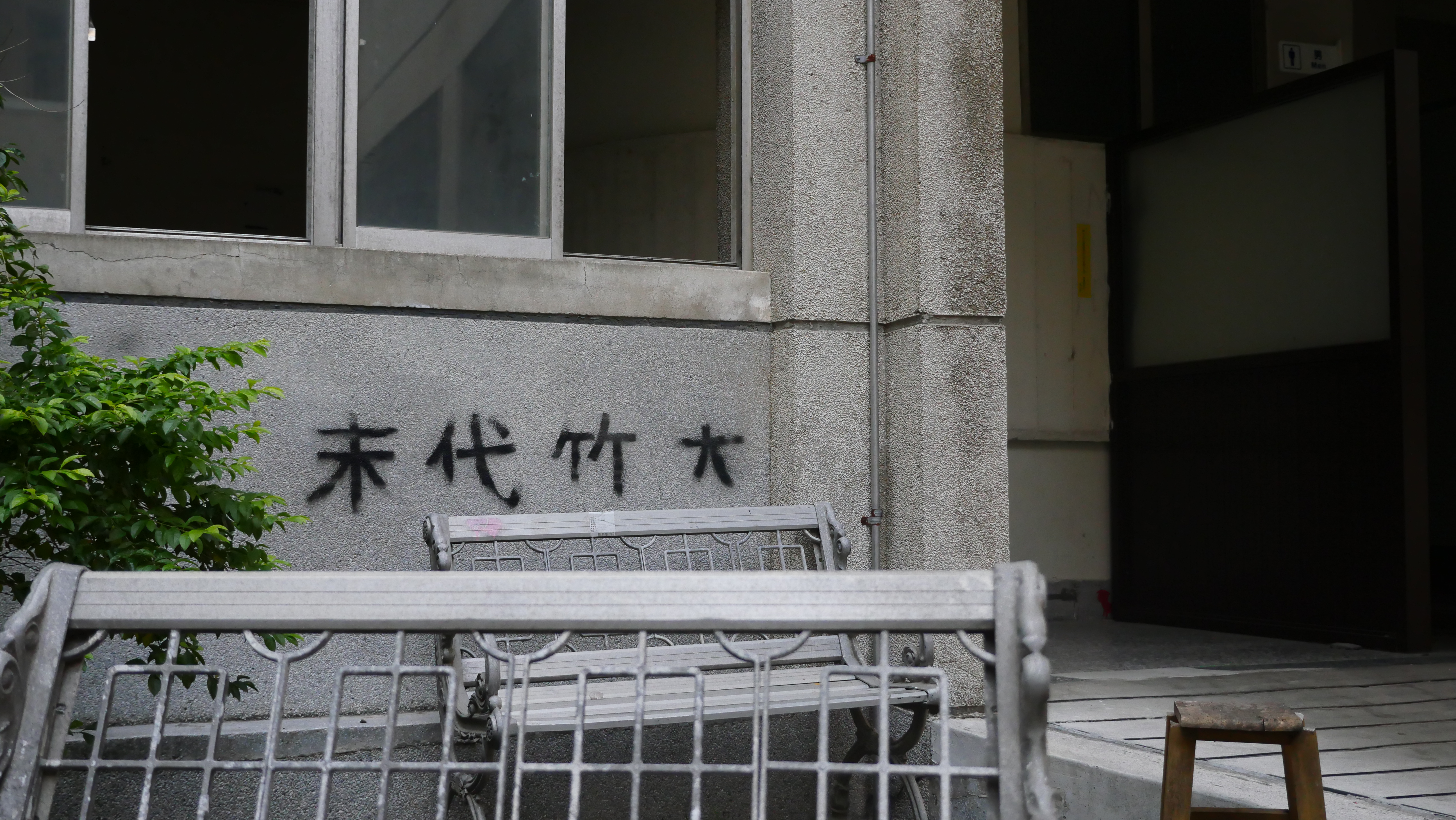 中文（台灣）: 國立新竹教育大學公共廁所門外「末代竹大」噴漆。